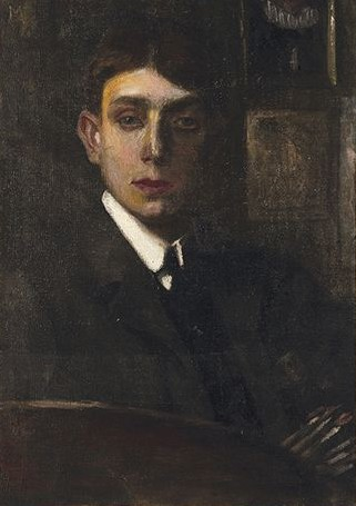 Max Horb - autoportrét